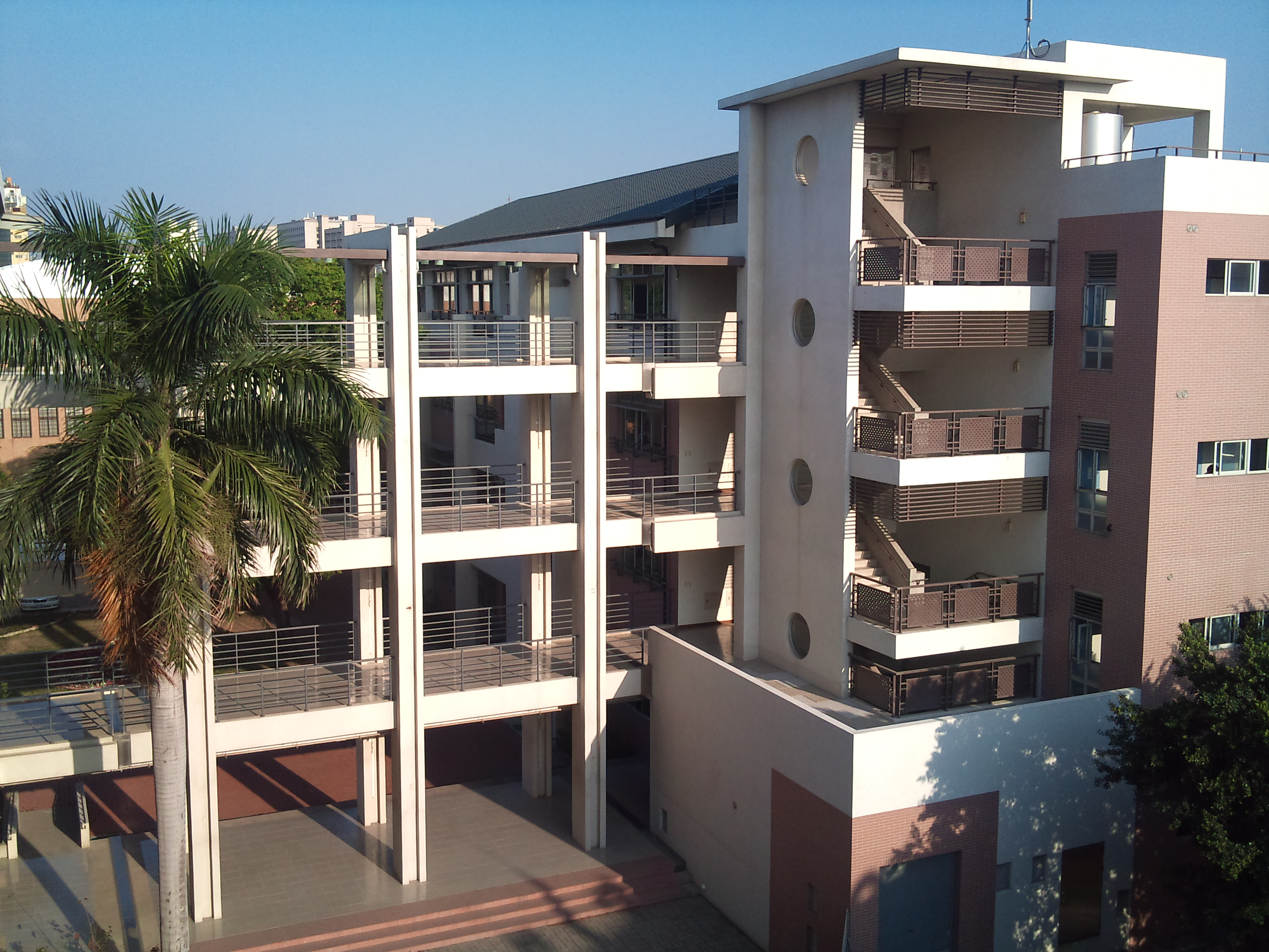 國立台南第二高級中學 - 仁愛樓